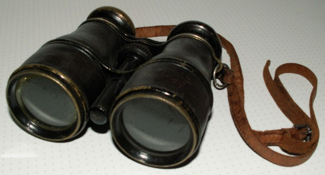 Summary Quelle: selbst fotografiert, 01/2006 Fotograf: Späth Chr. Lizenzstatus: Licensing